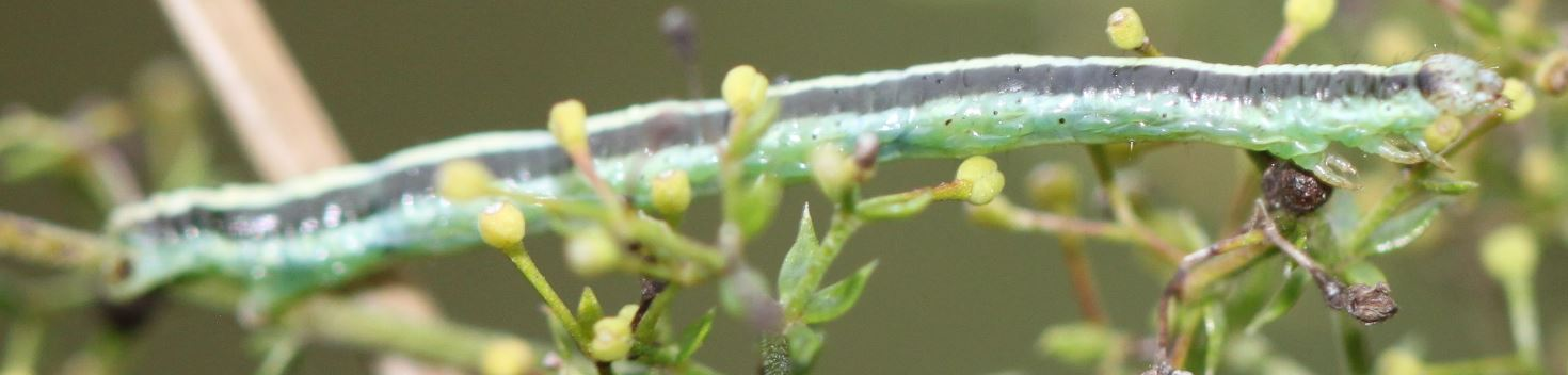 Raupe des Braunbinden-Blattspanner (Catarhoe cuculata) am 7.10.2016 in der Schwetzinger Hardt